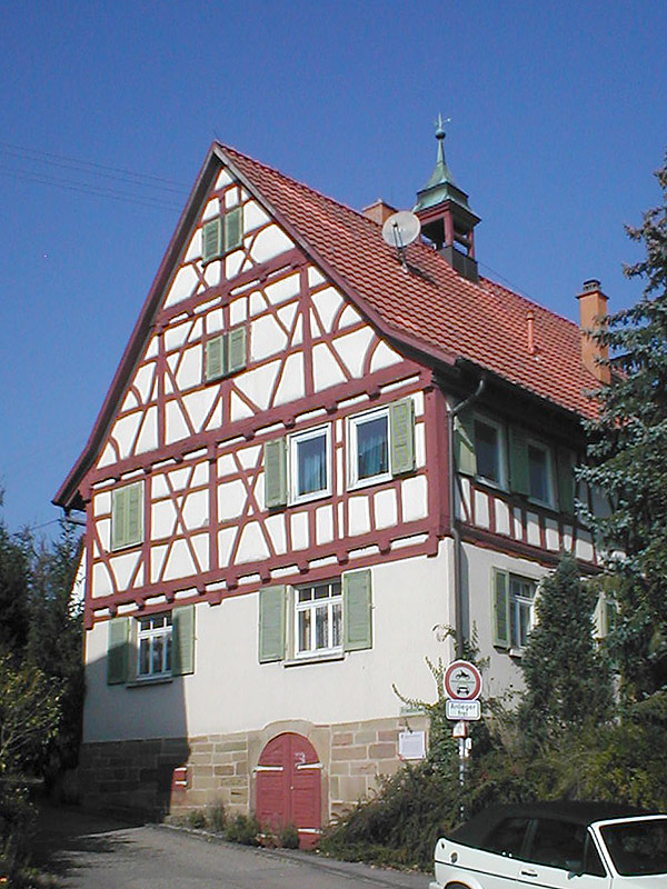 Ehemaliges Rathaus von Schmidhausen, heute Ortsteil von Beilstein, Baden-Württemberg, Deutschland